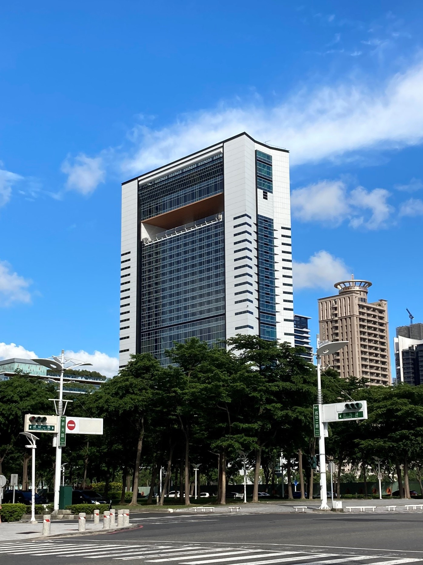 中文（台灣）: 高雄市立圖書館總館二期共構會展文創會館